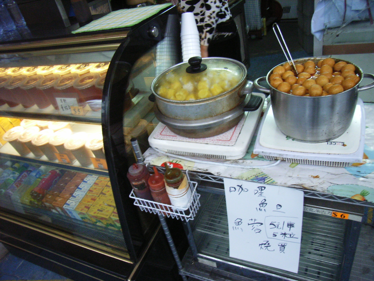 HK Wanchai Star Ferry piers 灣仔碼頭是香港的一個zh:渡輪碼頭，位於香港島的zh:灣仔北海旁，鄰近zh:香港會議展覽中心。灣仔碼頭現時設有來往灣仔至zh:尖沙咀及至zh:紅磡的2條天星小輪航線。